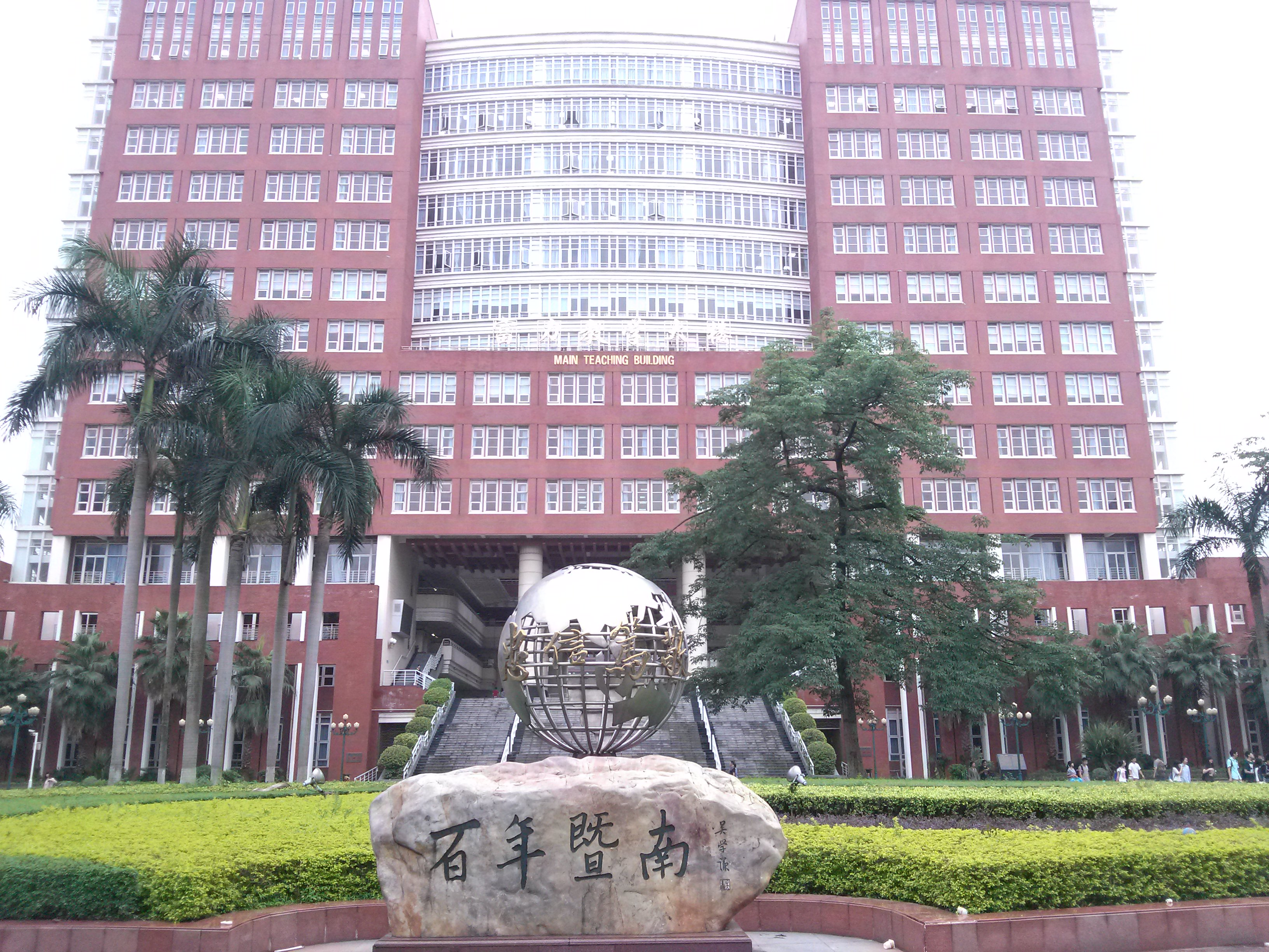 暨南大學本部教學樓